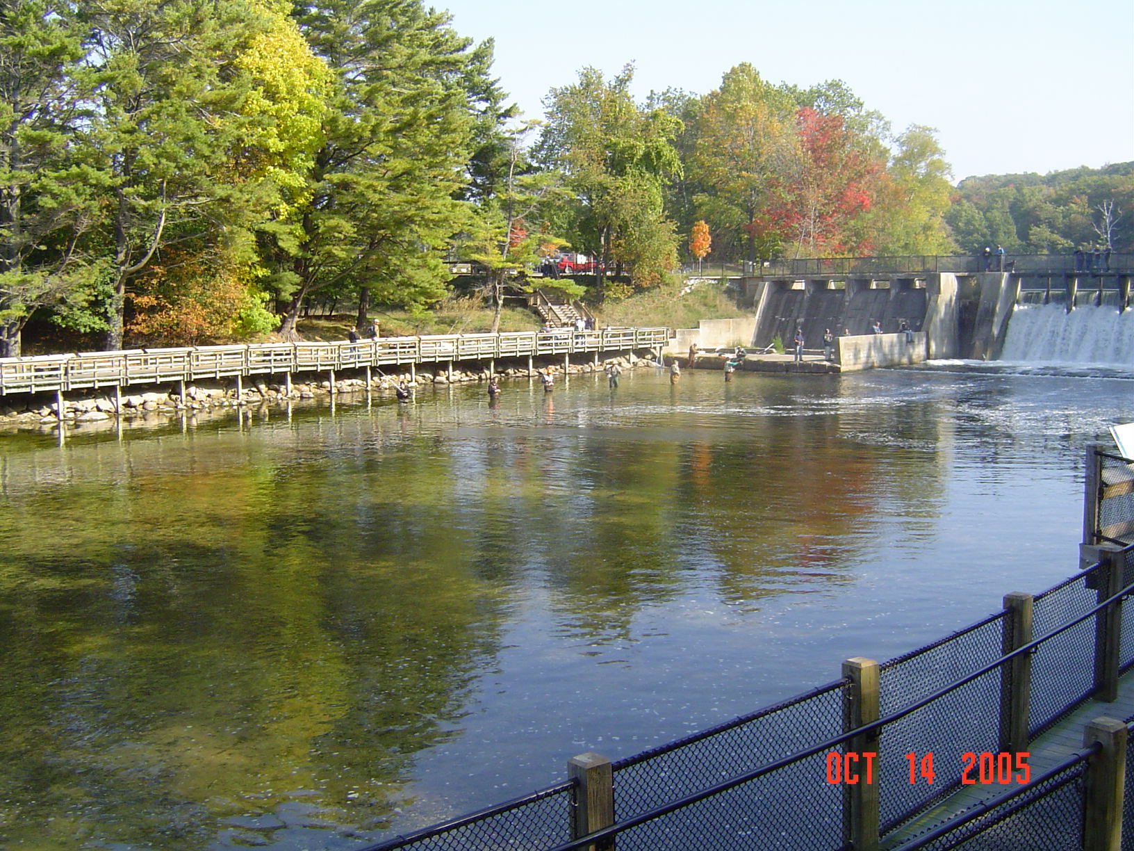 Hamlin Lake Dam